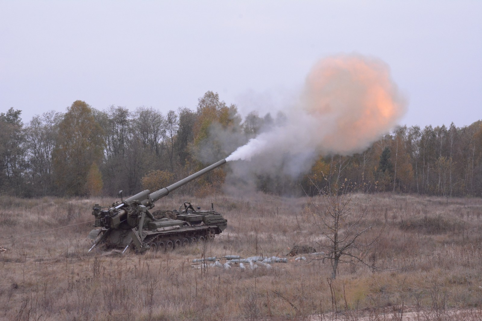 На полігоні “Дівички”, що на Київщині, відбувся практичний етап стратегічних командно-штабних навчань “Рубіж – 2016”. Навчально-бойові завдання виконували артилерійські підрозділи. Гарматні та самохідні дивізіони та батареї відпрацювали вогневі вправи зі знищення різних цілей. Проведення бойових стрільб дозволило підвищити рівень управління частинами і підрозділами, злагодженість артилерійських підрозділів та індивідуальну професійну майстерність військовослужбовців.